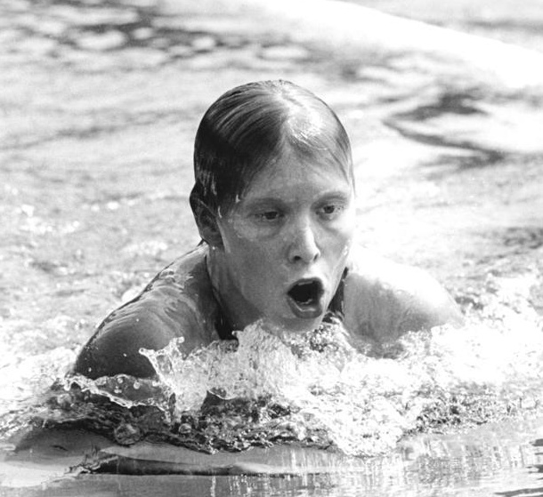 Bettina Löbel ADN-ZB Kluge 3-8-79 Brandenburg: 30. DDR-Meisterschaften im Sportschwimmen- 3. Tag. Im Entscheidungslauf über 200m Brust der Damen wurde Bettina Löbel (SC Einheit Dresden-16 Jahre) neue Titelträgerin.